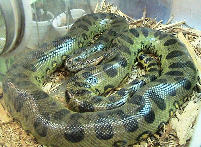 Eunectes murinus, Green Anaconda